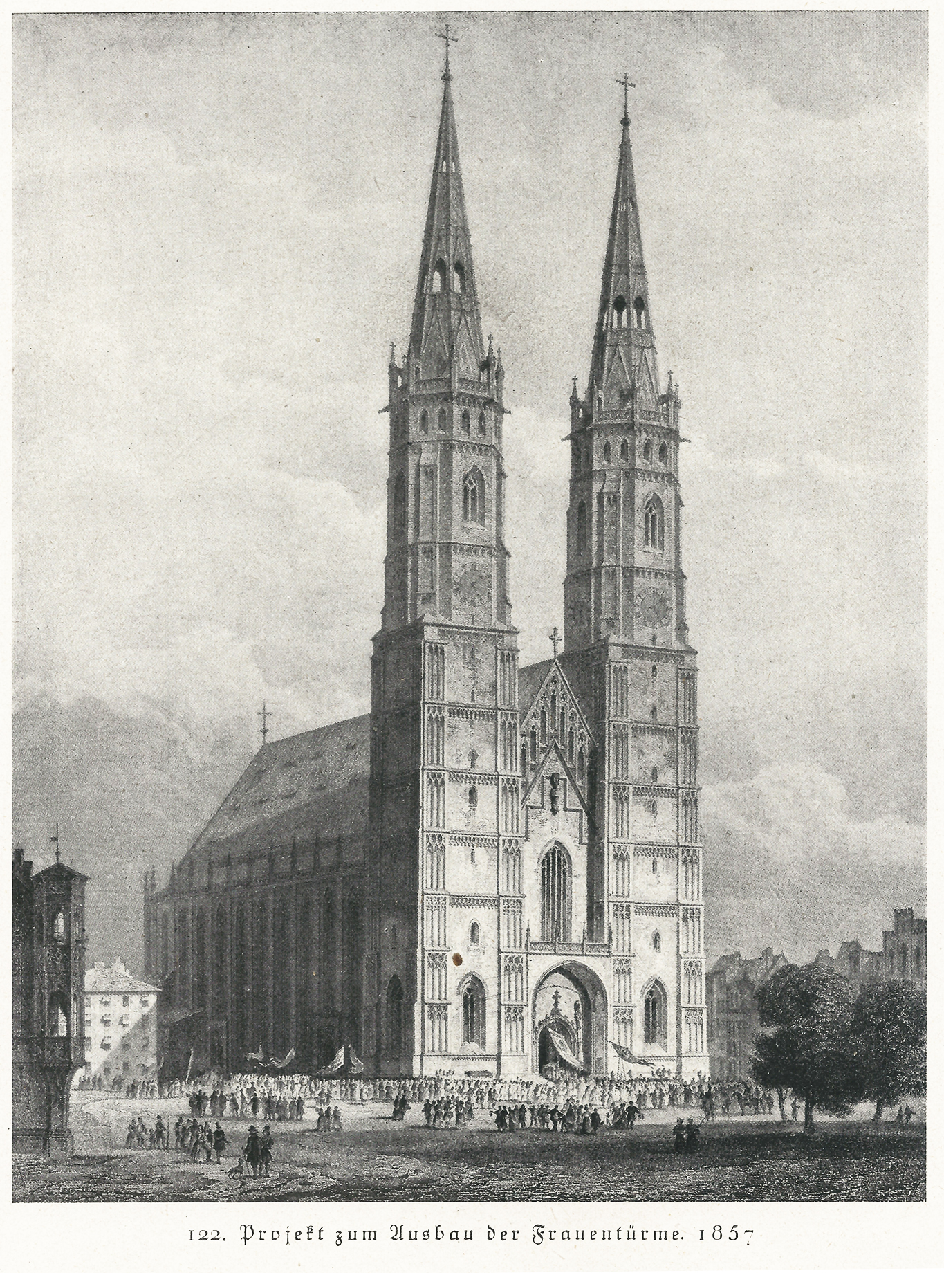 Plan zum Ausbau der Frauentürme (1857). Stahlstich von J.M. Kolb